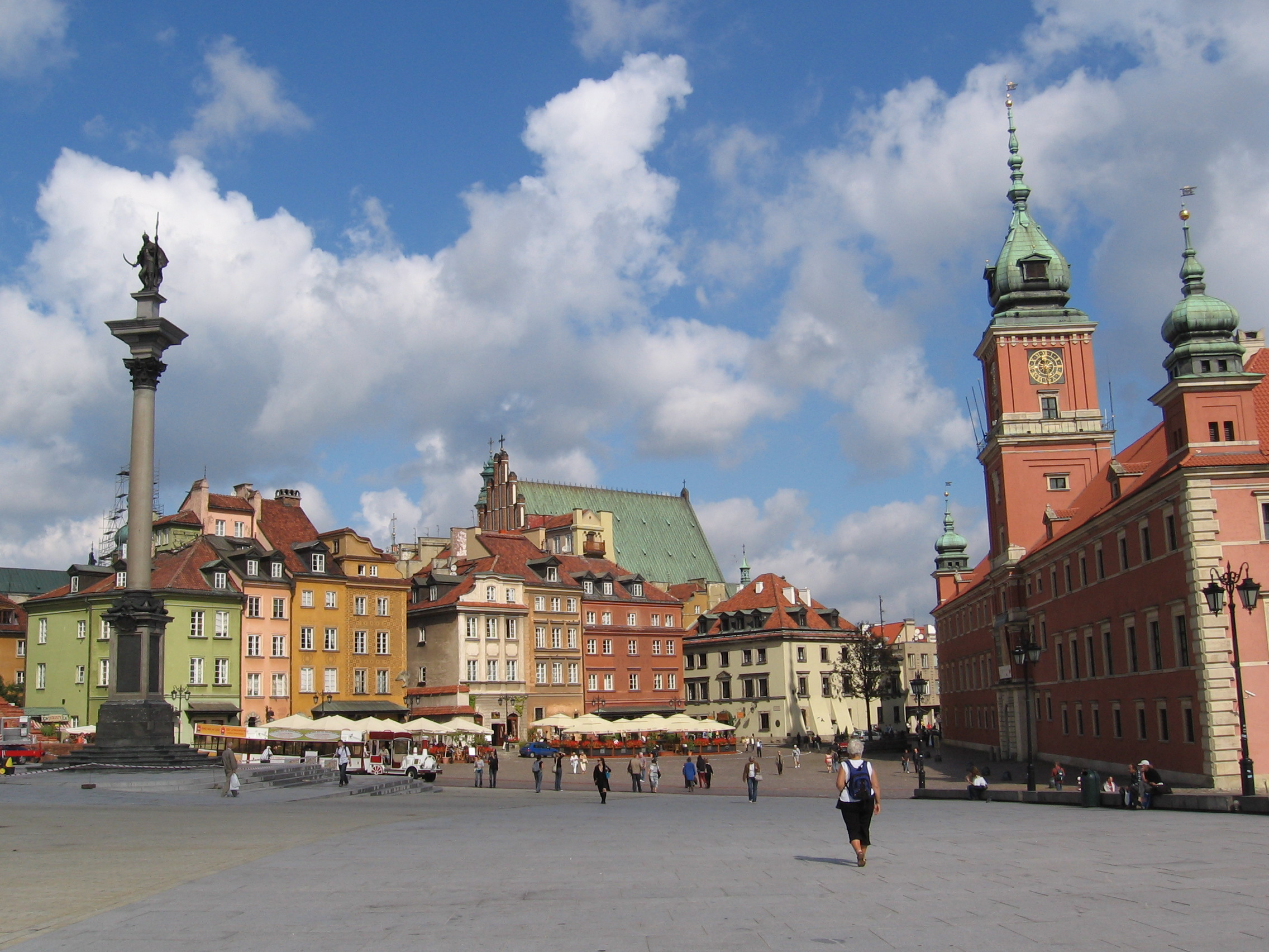 Старе Місто. Варшава.